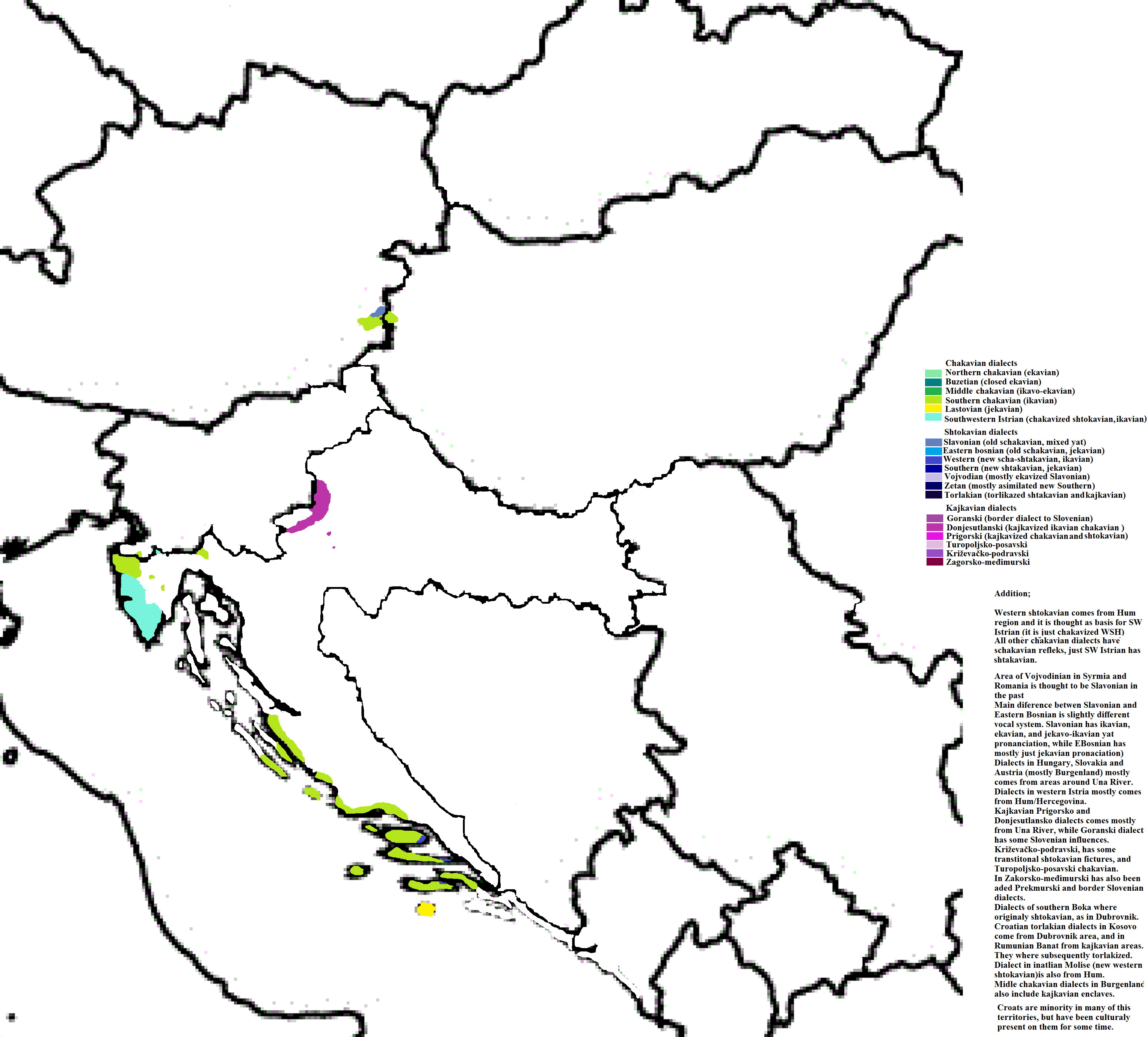 Južnočakavski i povezani dijalekti; donjesutlanski je kajkavizirani južnočakavski jugozapadni istarski je (južno)čakaviziran staroštokavski ikavski a lastovski je povezan s južnočakavskim (ista skupina, samo je refleks jata ekavski)